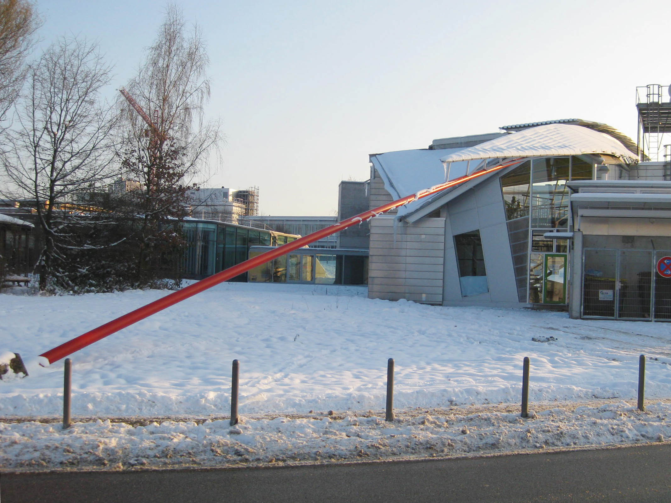 HYSOLAR-Haus, 1987-89, heute: „Visus Institut“ (Visualisierungsinstitut) der Universität Stuttgart. Konzeption + Realisierung: Behnisch & Partner